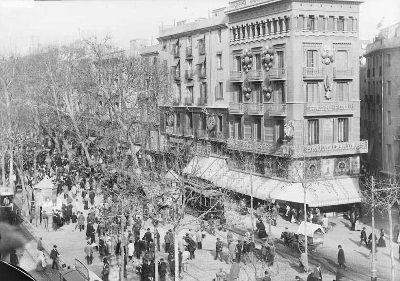 Vista en picat de grups de persones caminant per la rambla; a la dreta, el pla de la Boqueria i la casa Bruno Cuadros o dels Paraigües.